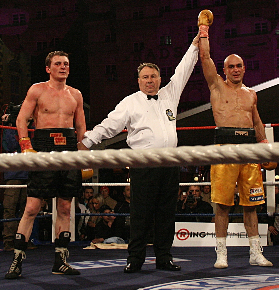 Proglašenje pobjednika nakon borbe Vedrana Akrapova i Alekseja Čirkova u Zagrebu